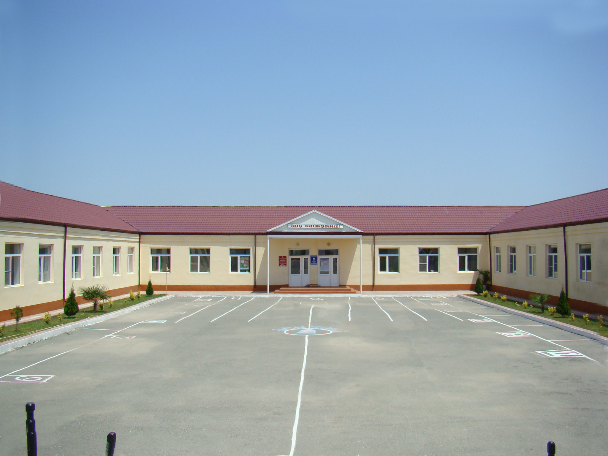 Yasif Kərimov adına Yeni Daşkənd kənd tam orta məktəb — Azərbaycan Respublikasının Bərdə rayonunun Yeni Daşkənd kəndində ümumi təhsil müəssisəsi.